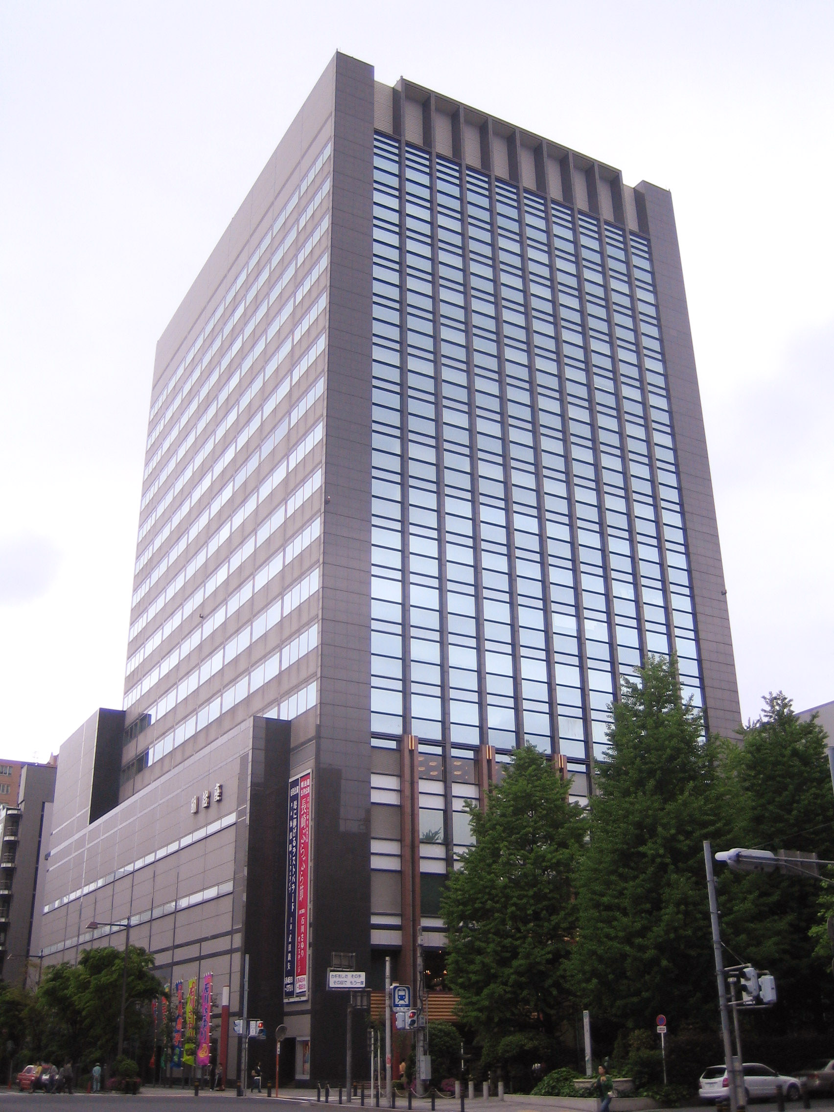 Meijiza (明治座), a theatre in Chuo, Tokyo, Japan